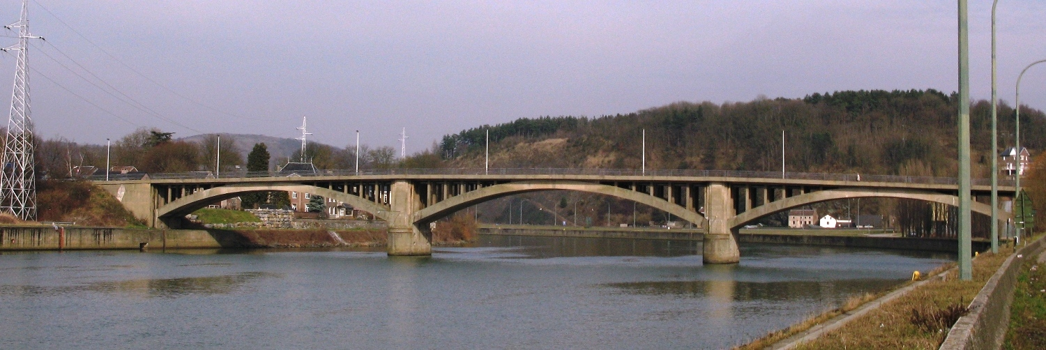 D'Bréck vun Ombret vum ritesen Uwänner gesinn. Ombret Ombret